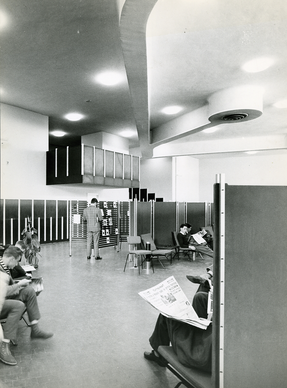 Ivrea. Sede Olivetti. Nuove Officine ICO. Esterni e interni con i dipendenti. Ambienti comuni. Mensa e sala lettura. Servizio fotografico : Ivrea, 1960 / Paolo Monti. - Stampe: 4 : Positivo b/n, gelatina bromuro d'argento/ carta, 30x40. - ((Al verso delle stampe iscrizioni didascaliche manoscritte a matita: "Olivetti". - Sul coperchio della scatola iscrizione didascalica manoscritta a pennarello nero: "Musei - Architettura moderna".